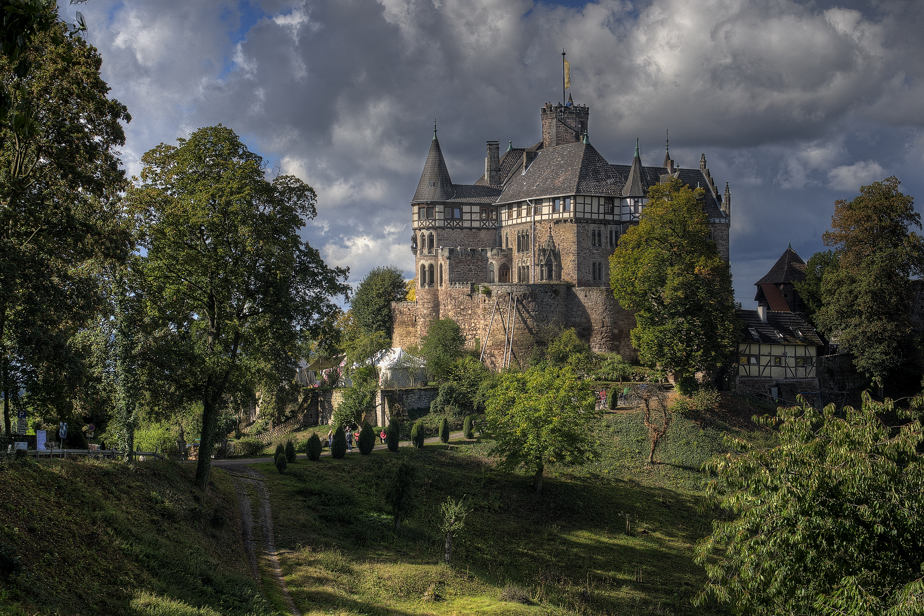 Schloss Berlepsch bei Witzenhausen. Das Schloss liegt auf einem Felskegel nahe der Grenze zwischen Hessen und Niedersachsen und ist seit rund 650 Jahren im Familienbesitz der Sittich von Berlepsch.